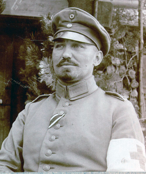 Fotografie von Prof. Dr. Johannes Reinmöller als Stabsarzt der Bayerischen Armee im Ersten Weltkrieg.